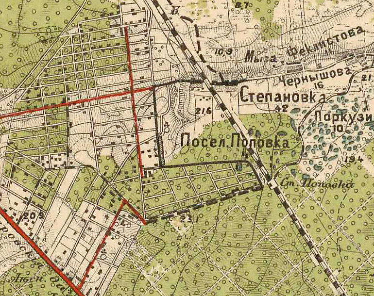 Посёлок Поповка на карте района манёвров 1913 года.